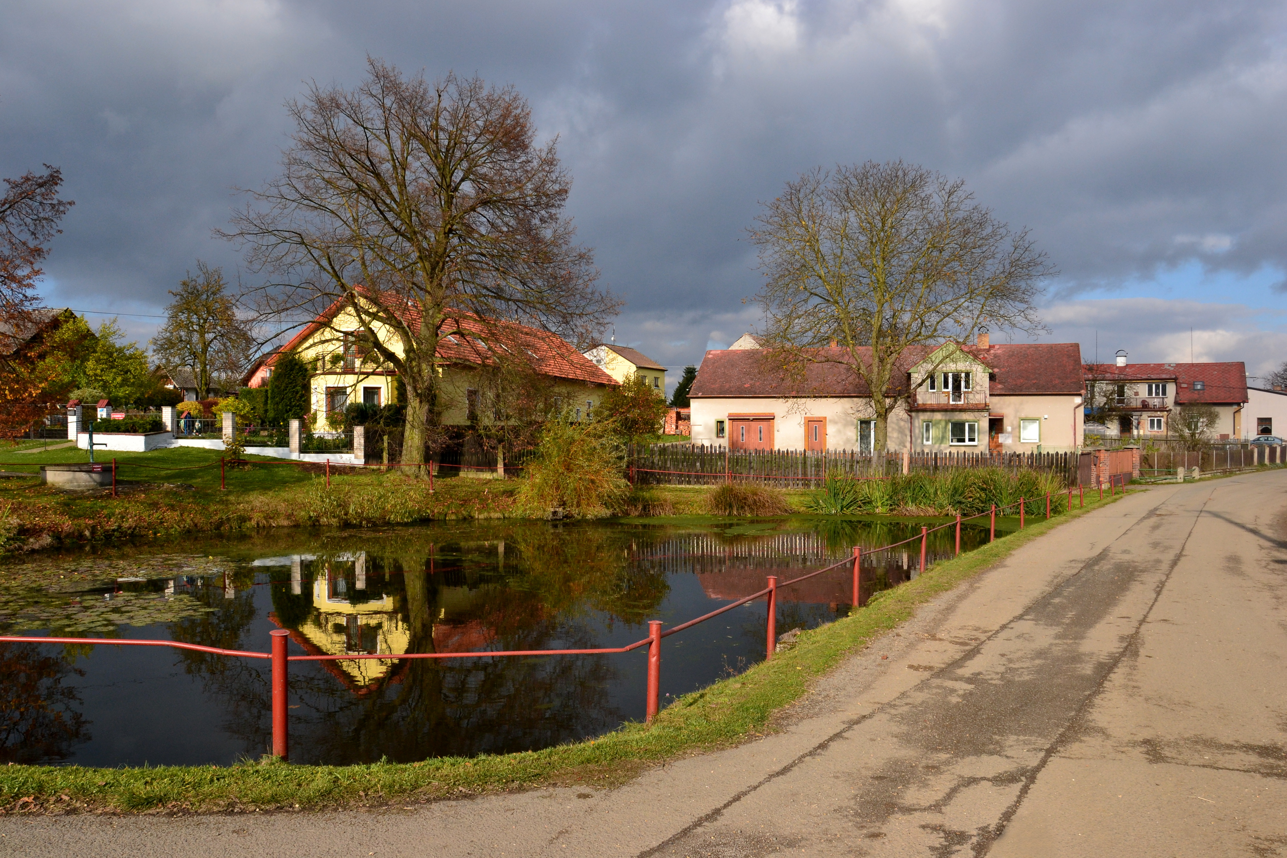 Hvozd - vodní nádrž na návsi